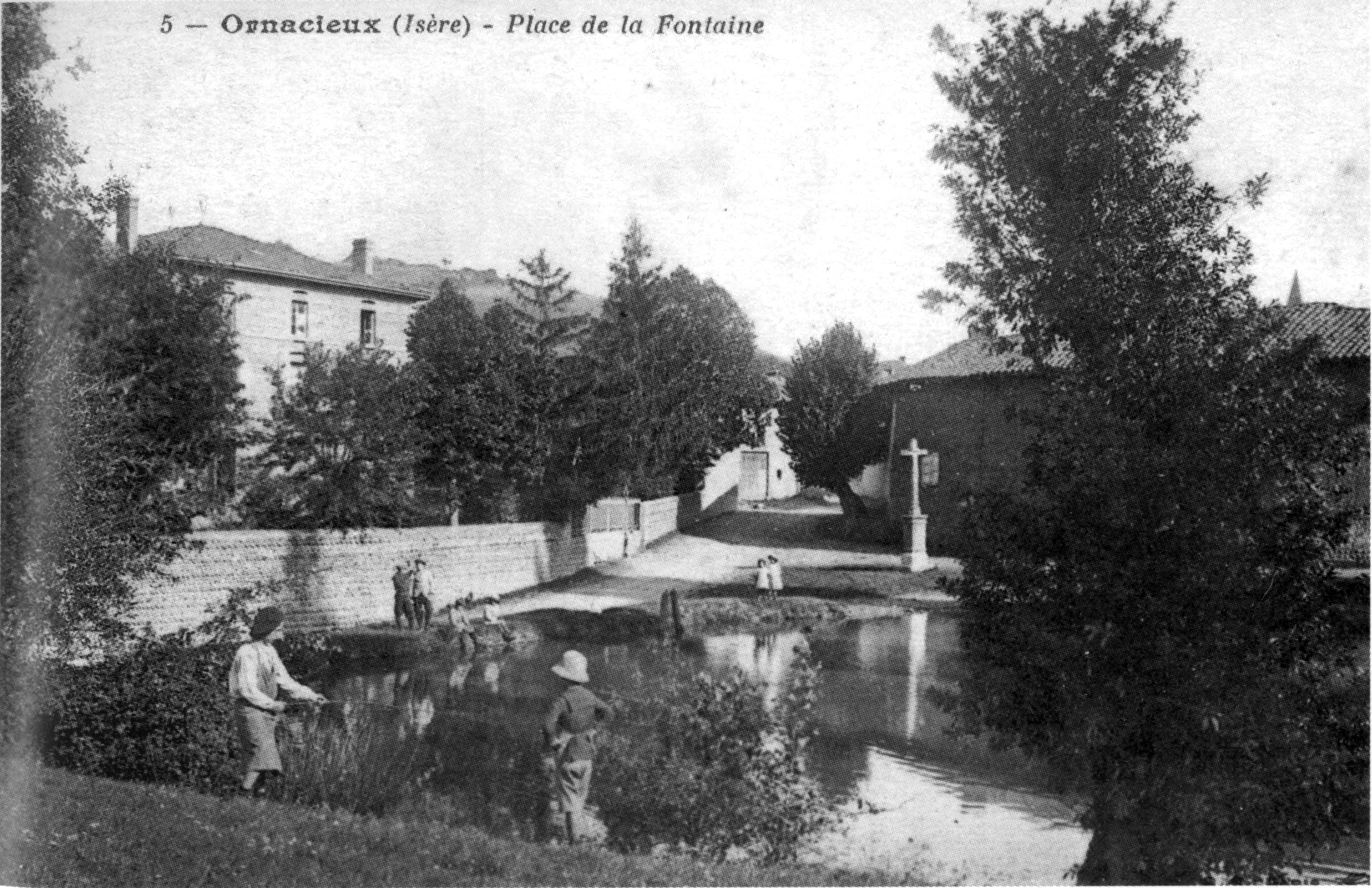 Ornacieux, place de la fontaine, 1909